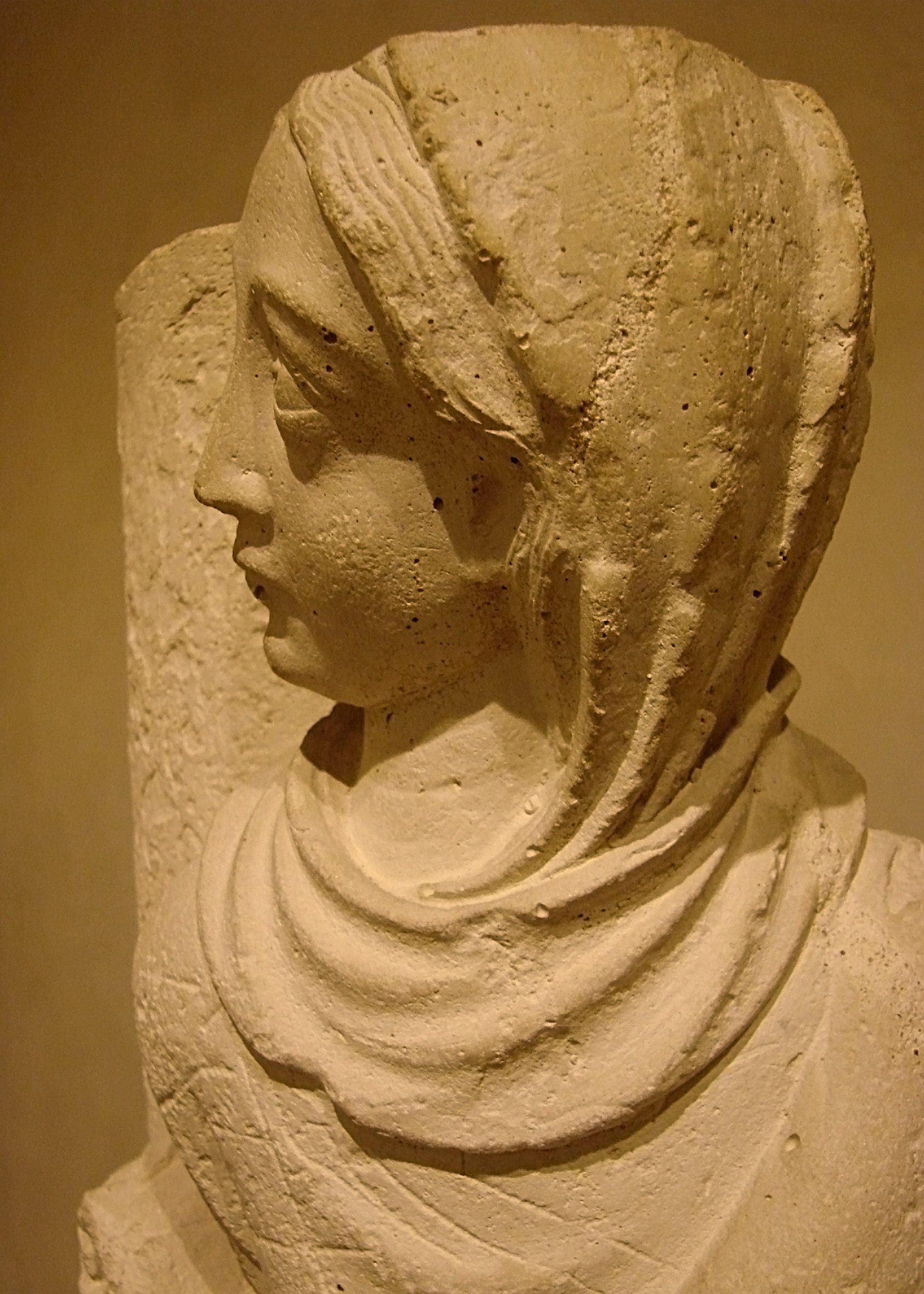 La veuve de Sarepta (Moulage de l'original conservé à Anvers). Statue-colonne du cloître de Notre-Dame-en-Vaux, 12ème siècle. Ce cloître roman, détruit au 18ème siècle, a été en partie reconstitué à partir des fragments retrouvés. Musée du cloître de Notre-Dame-en-Vaux, Châlons-en-Champagne (51), France.